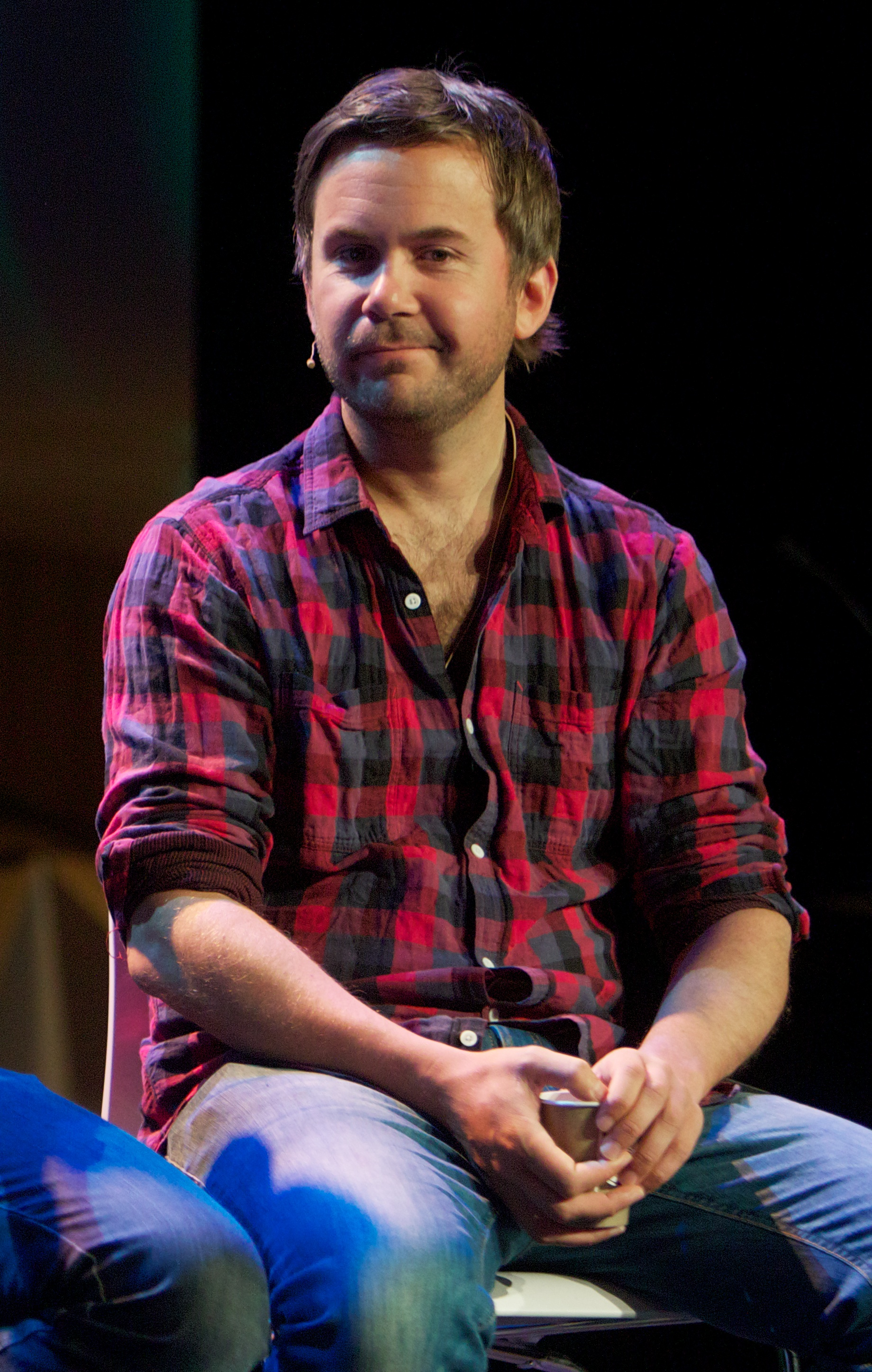 Bergen, 20110513. Nordiske Mediedager, fredag. Eckbo & Ødegård nisser igjen. Foto: Eirik Helland Urke